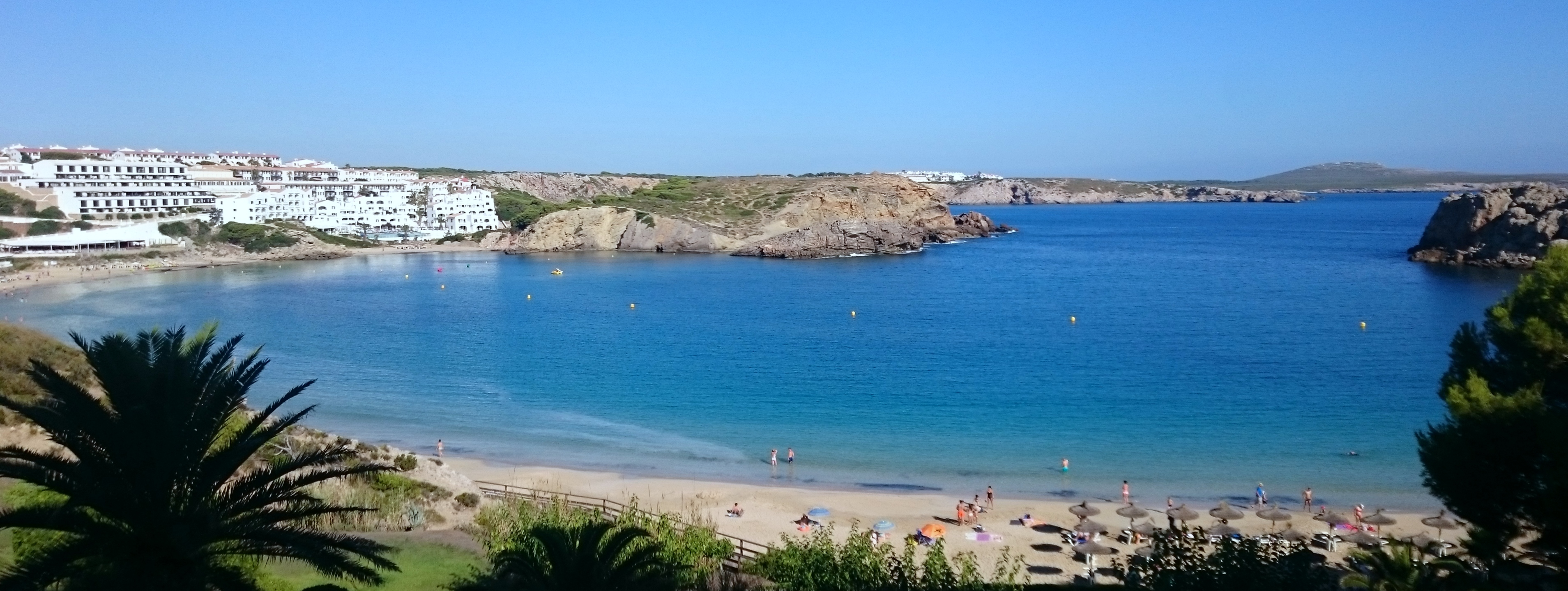 Punta Redona - Arenal d'en Castell This is a photography of a Special Area of Conservation in Spain with the ID: ES5310070. Natura2000 entry, EEA entry